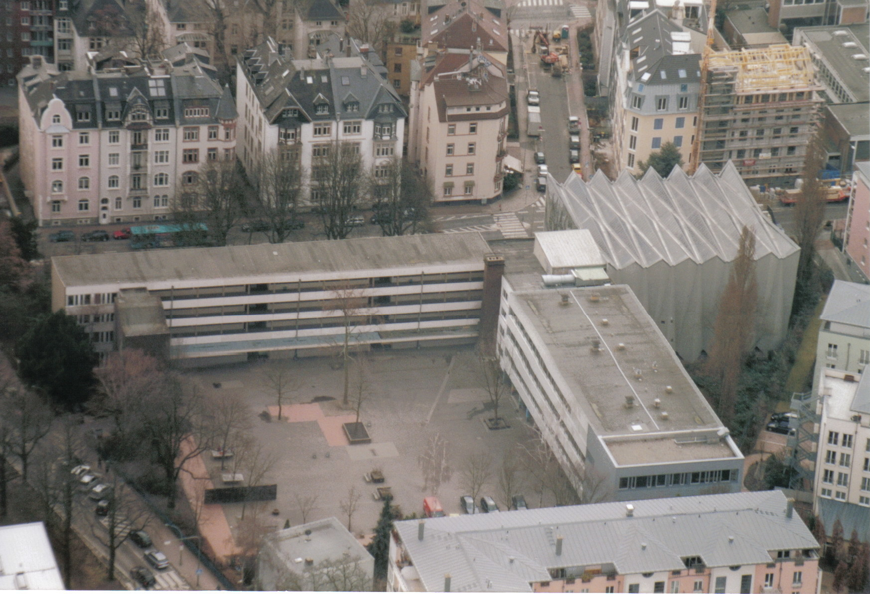 Lessing-Gymnasium Frankfurt von oben